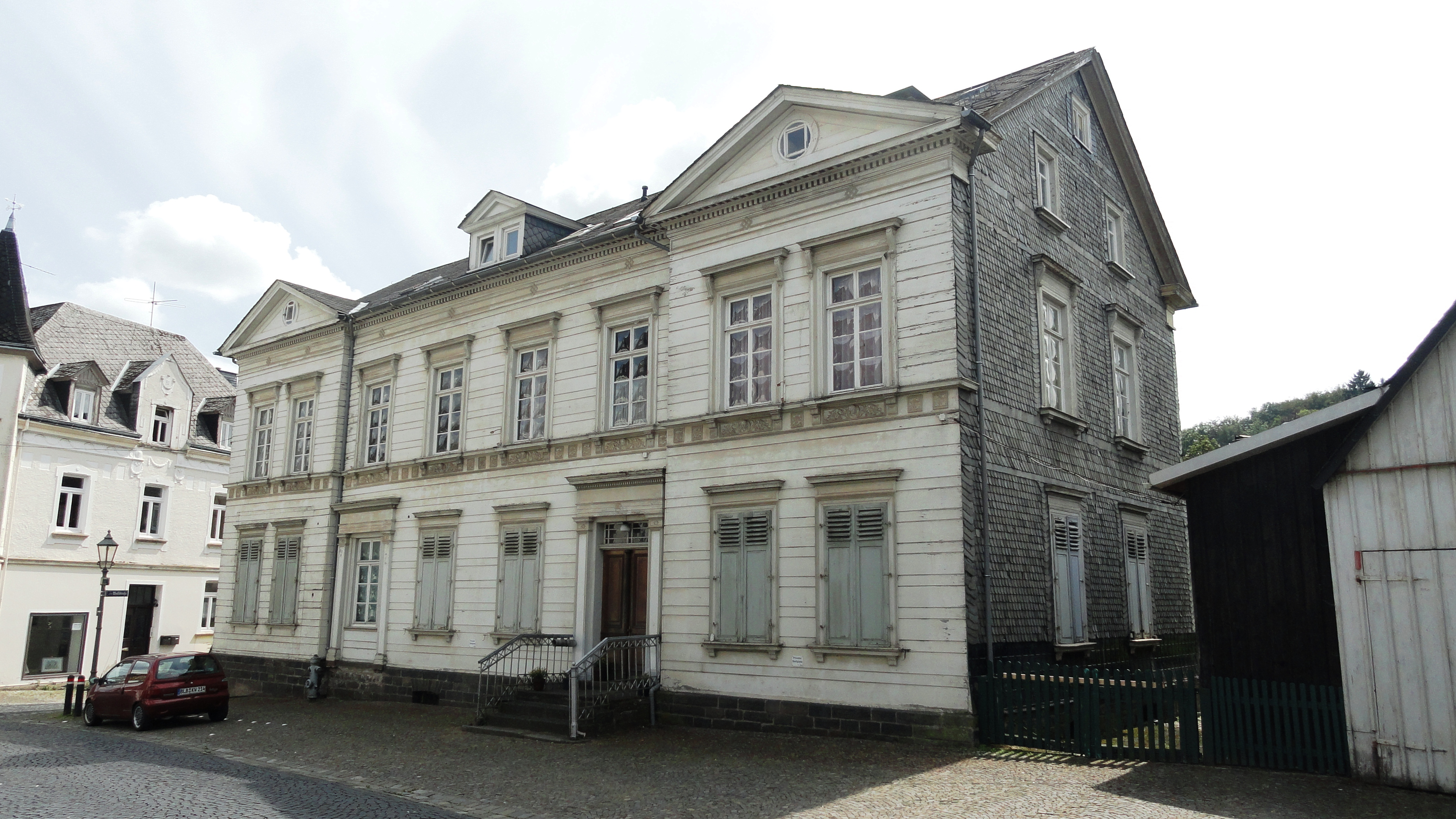 Das 1868 errichtete Gebäude hat zur Königstraße eine Holzfassade mit Reliefplatten im Stil des Spätklassizismus. This is a photograph of an architectural monument.